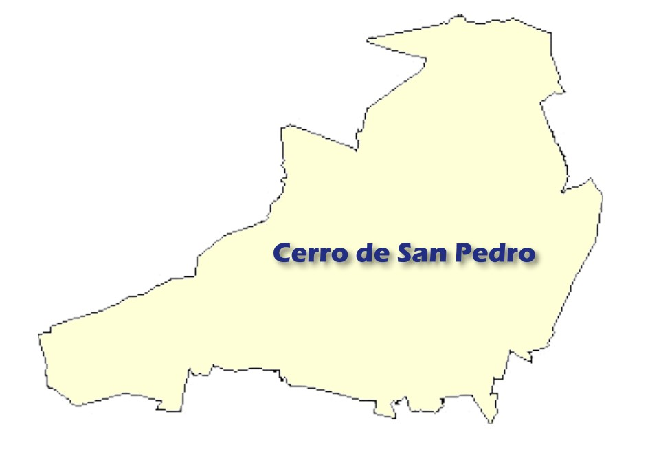 Mapa de Cerro de San Pedro